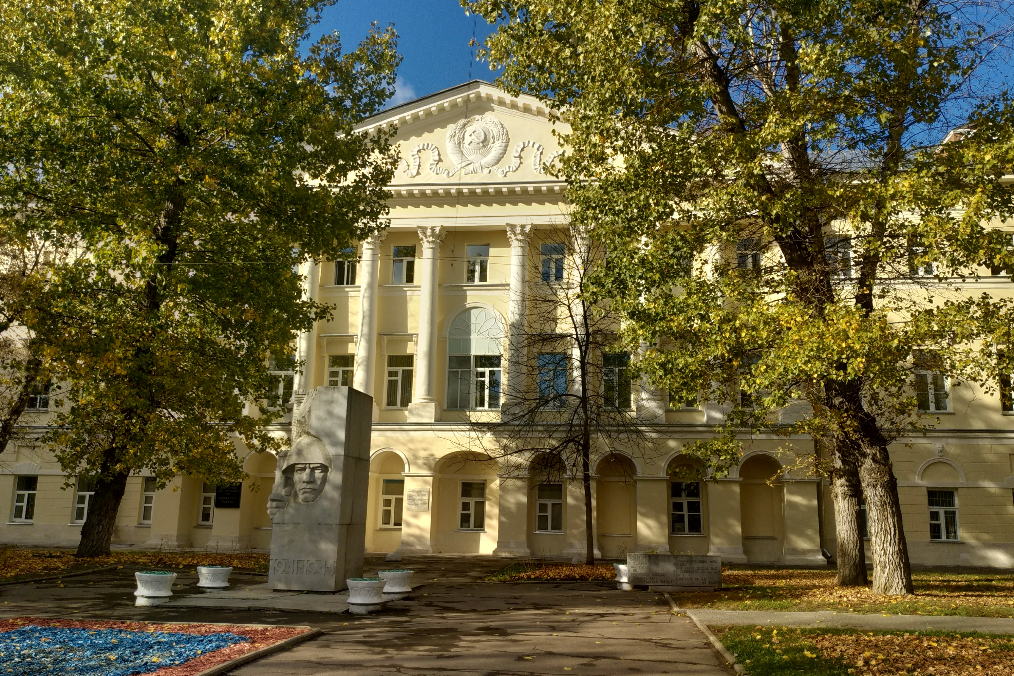 Фасад главного здания МГЛУ после реставрациии.